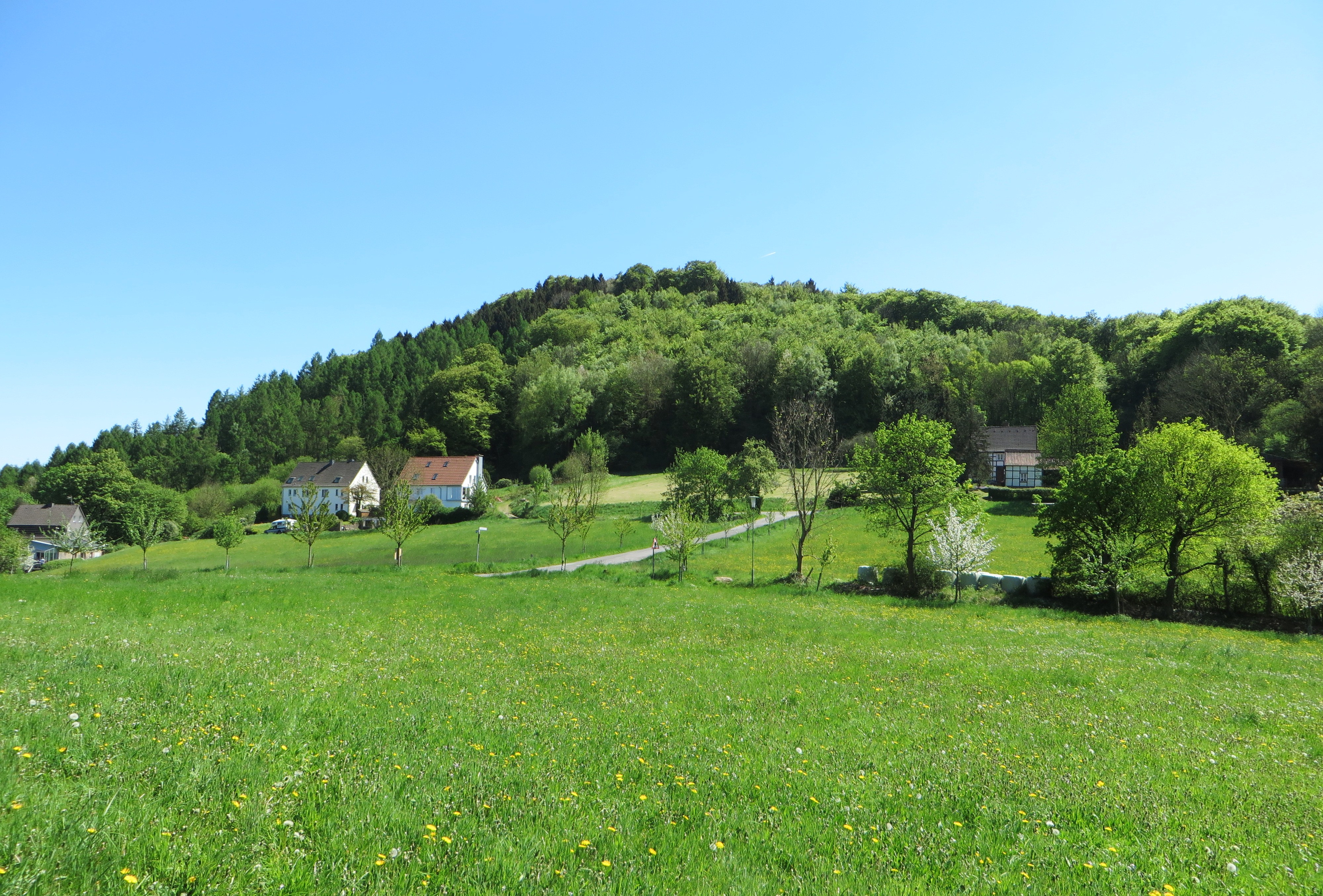 Naturschutzgebiet Raffenberg (NSG HA-018) in Hagen-Hohenlimburg. Blick vom Naturschutzgebiet Hünenpforte auf den Raffenberg (240 m), zwischen Piepenbrink und Hohenlimburger Straße (B 7). Teilbereiche der Kalkkuppe werden durch Orchideen-, Hainsimsen- und Perlgras-Buchenwald bestimmt. Im Südosten schließt ein Buchenaltholz das Schutzgebiet ab. Diese Fläche wird durch einen SW-NO verlaufenden Gesteinswechsel in zwei ökologisch unterschiedliche Bereiche geteilt. Auf der Bergkuppe befinden sich Reste der mittelalterlichen Raffenburg.